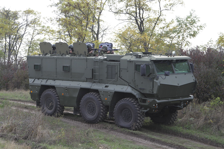 Боевая подготовка военнослужащих 22-й отдельной бригады специального назначения.